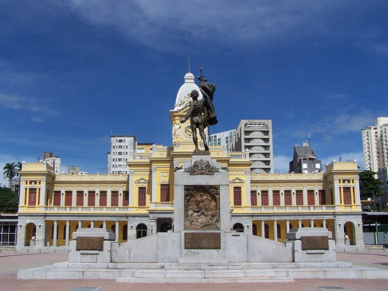 Praça da Estação em Belo Horizonte - MG, Brasil.